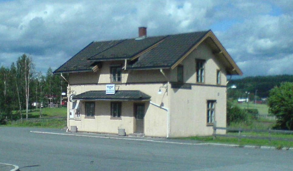 Bilde_av_Bjørkelangen_stasjon